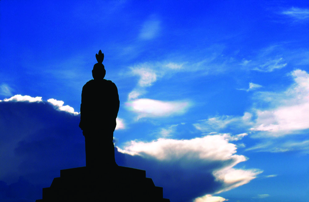 Estatua de Conín